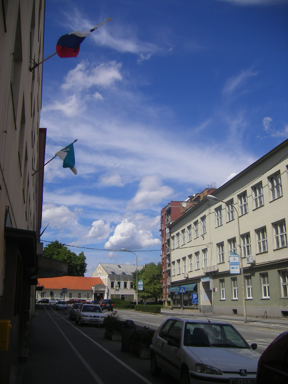 Muraszombat - Murska Sobota